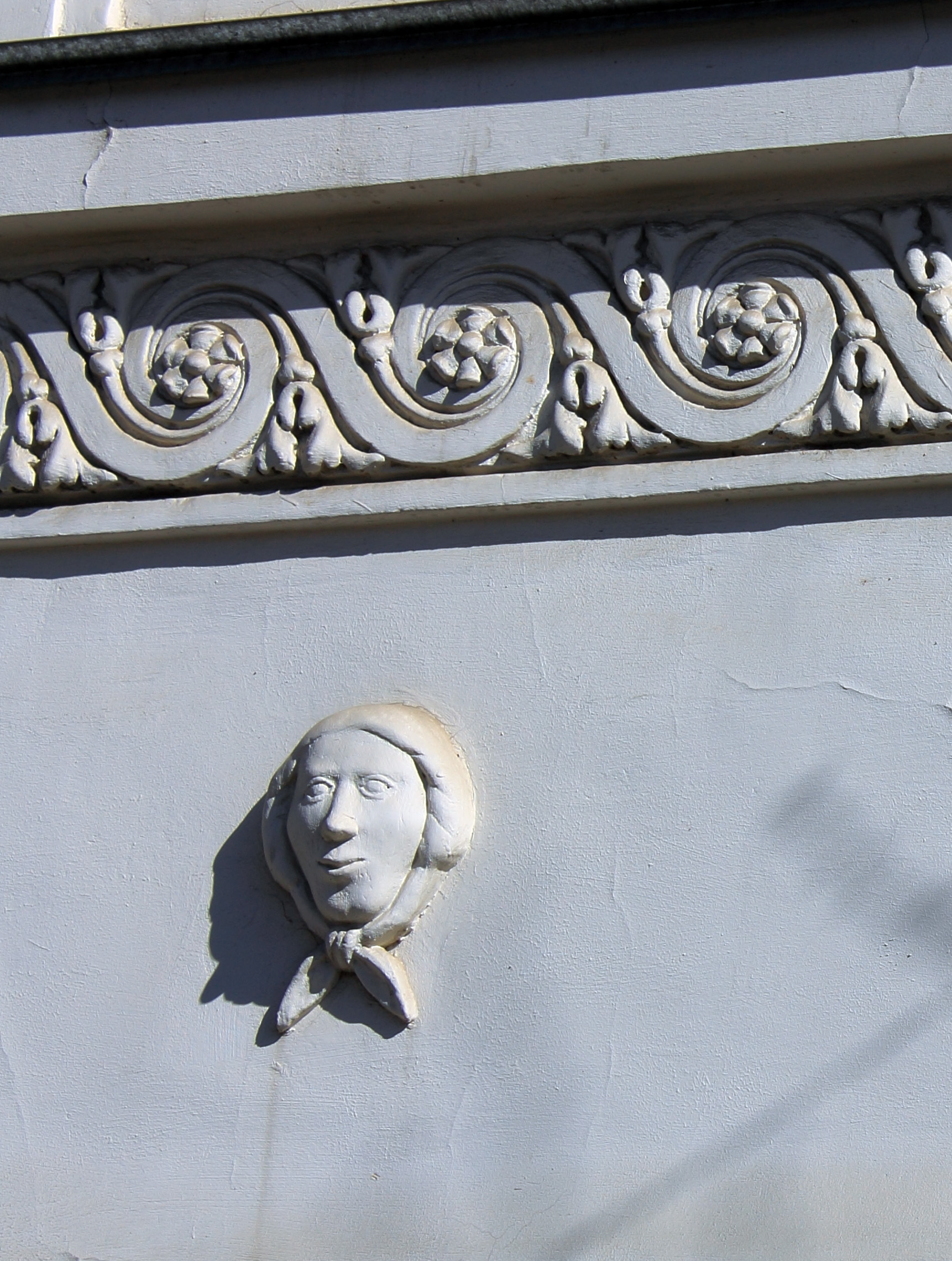 Усадьба Рябининой: улица Ильинская, 56, Нижний Новгород, Нижегородская область